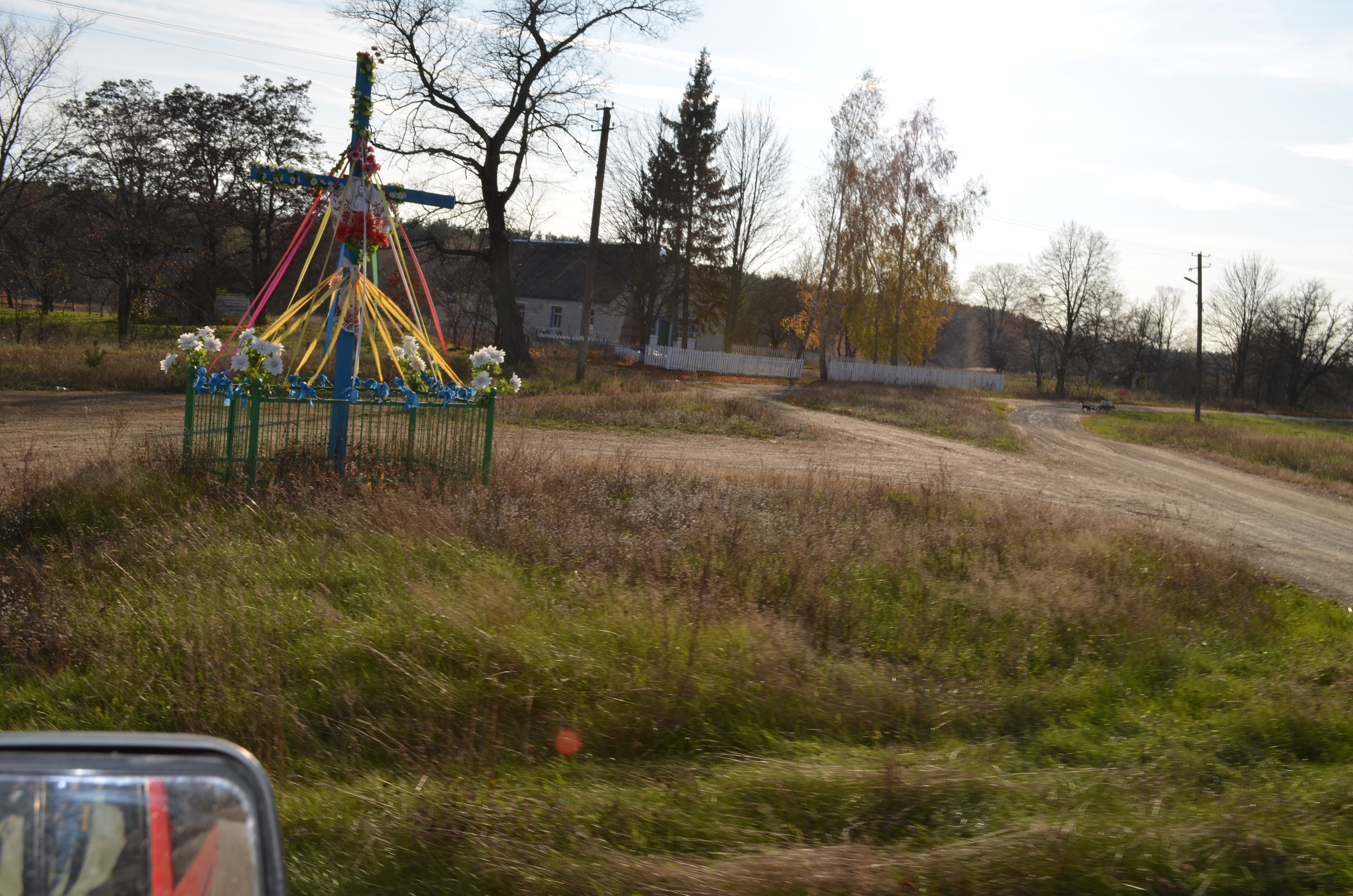 с. Ушиця